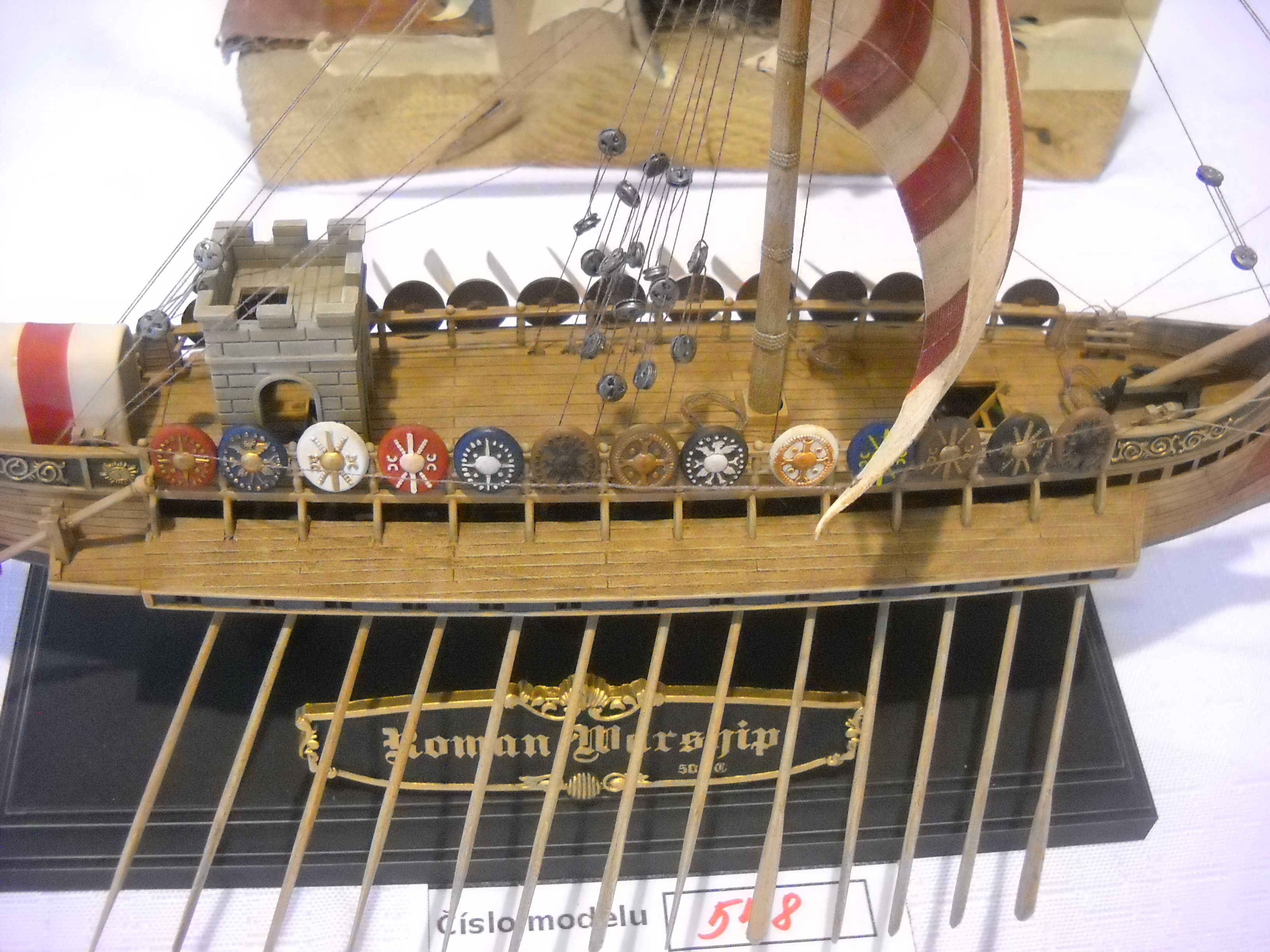 Fotka z 8. ročníku modelářské soutěže Plastic people of Tovačov, která se konala 20. května 2017